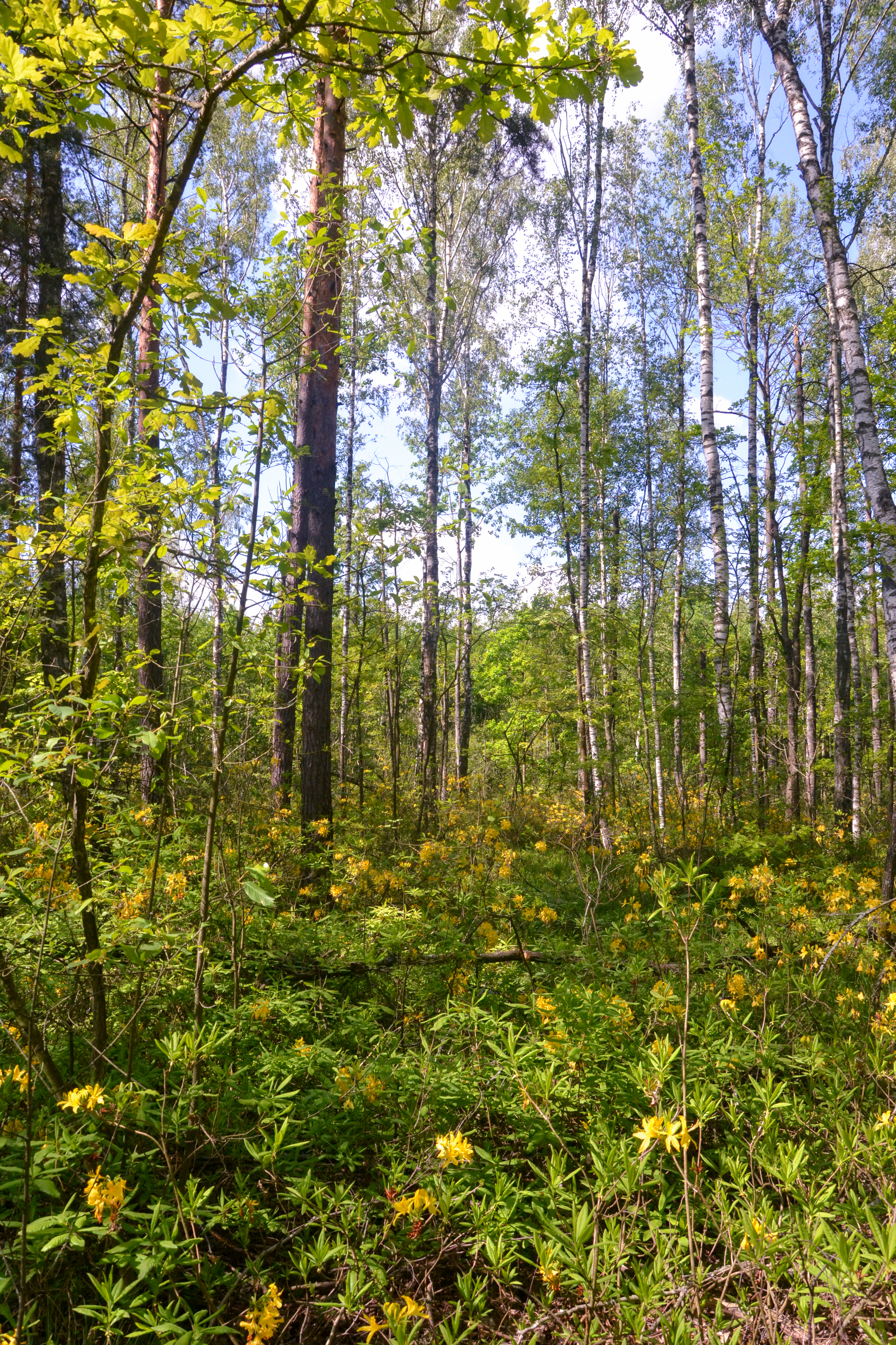 Змішаний із домінуванням берези ліс із рододендроновим підліском. Мельницький, Лугинський р-н, ДП «Лугинське ЛГ», Радогощанське лісництво, кв. 4, кв. 11